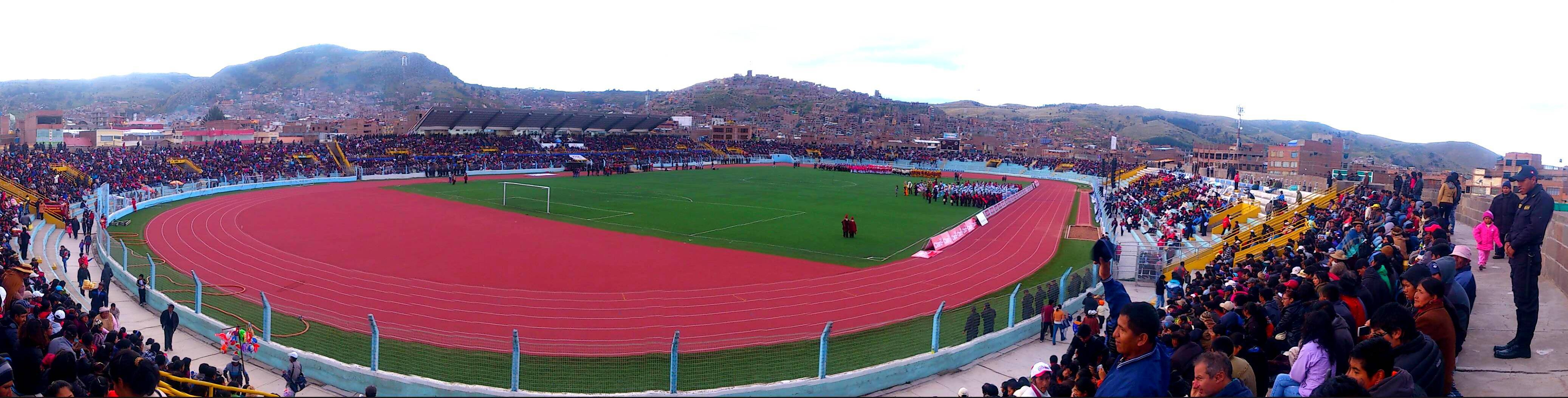 Candelaria 2014